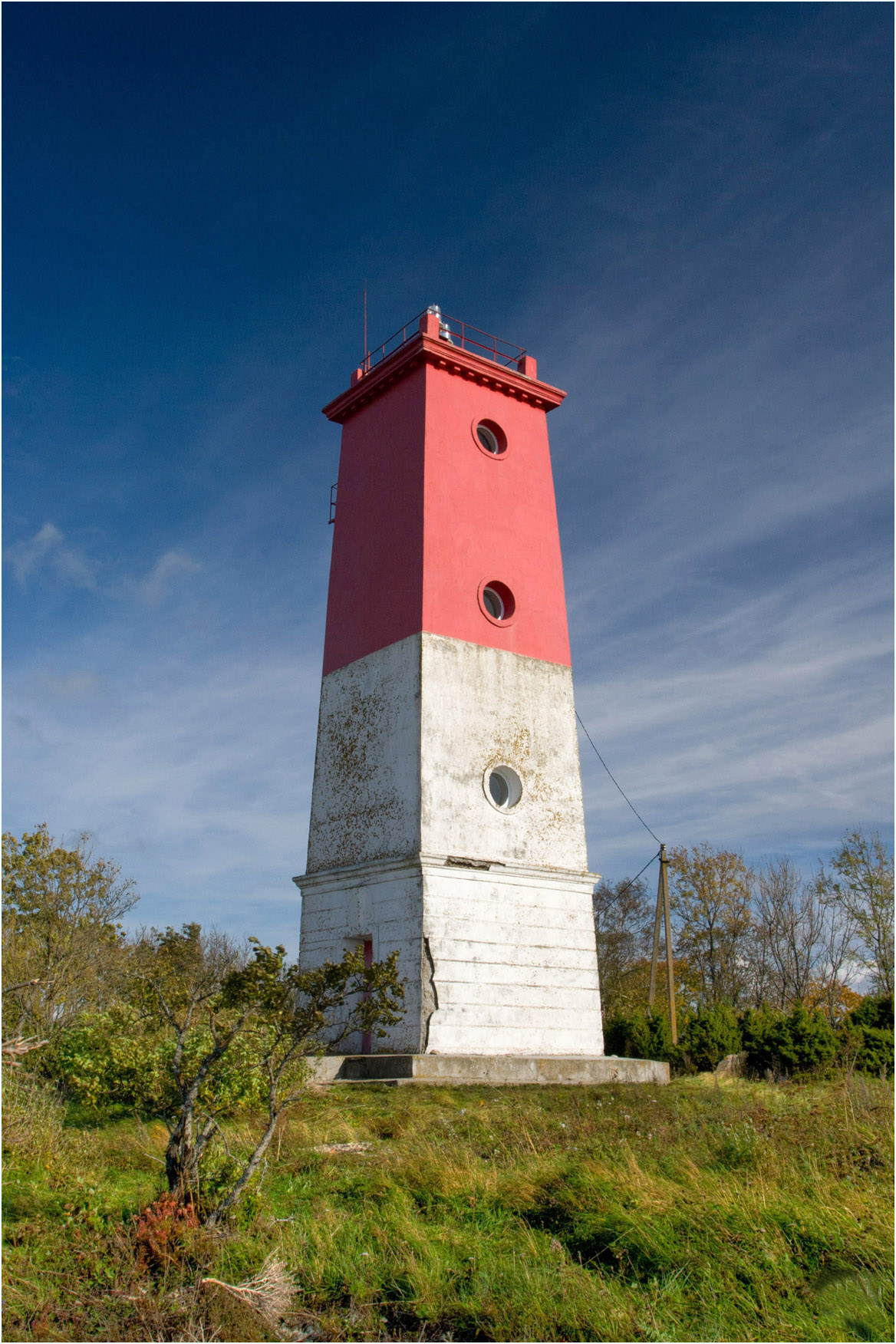 Virtsu tuletorn